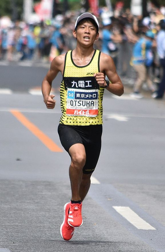 大塚 祥平